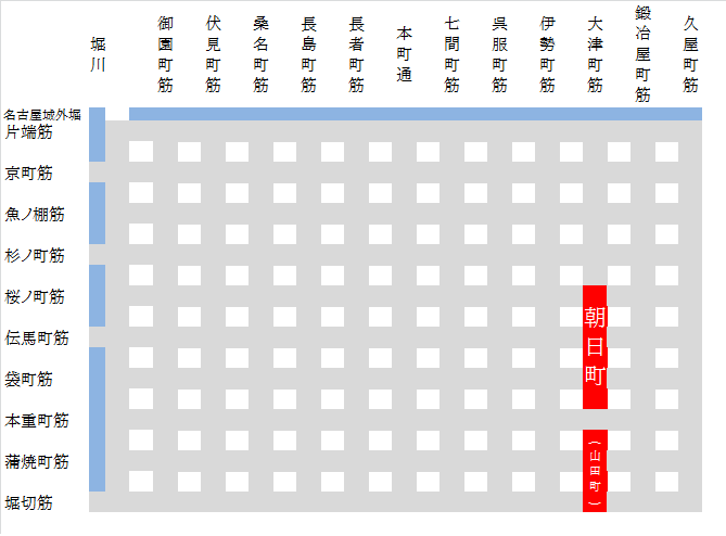 名古屋城下碁盤割模式図（朝日町位置）